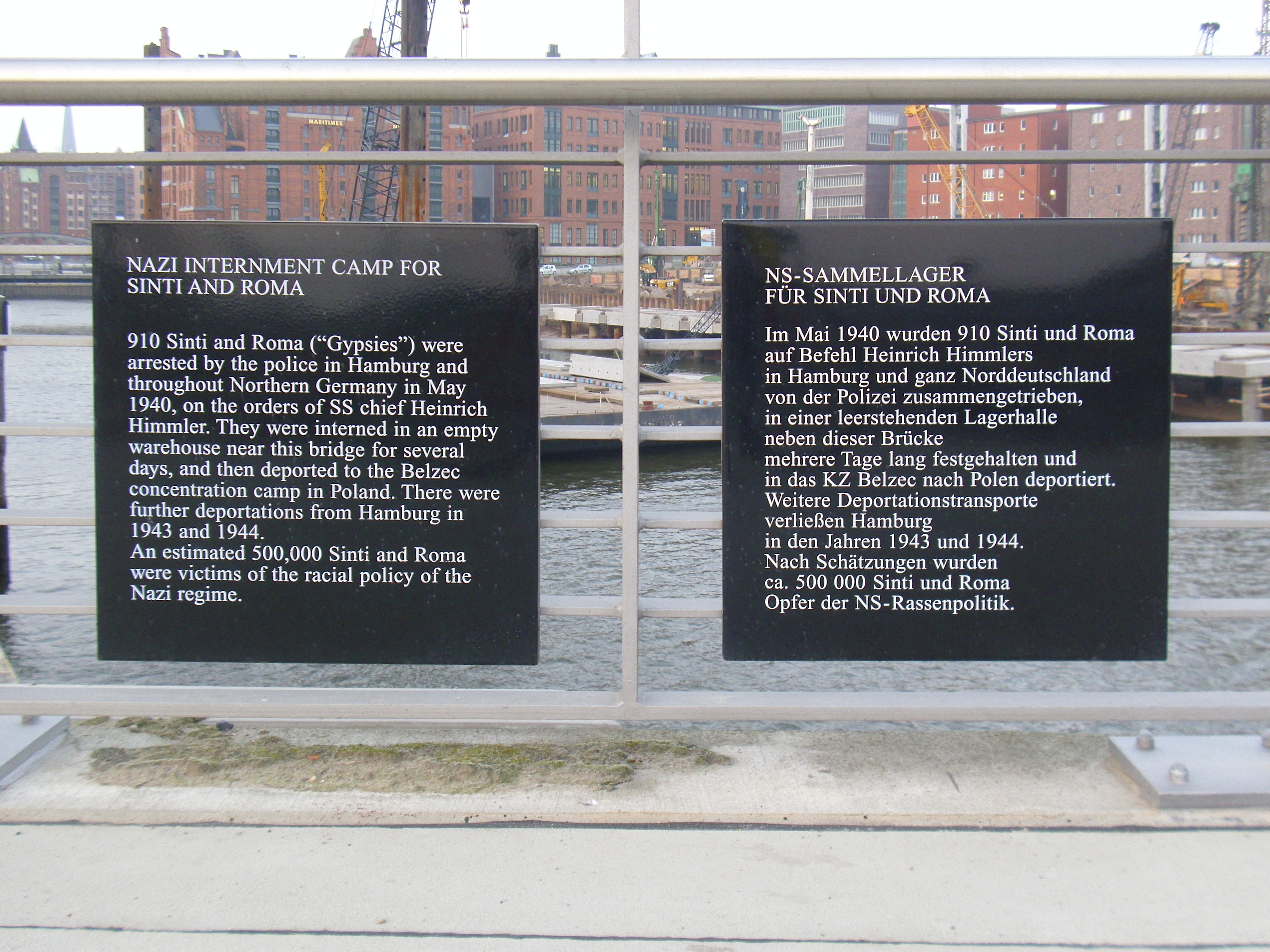 Gedenktafeln zur Erinnerung an die Sinti und Roma, die 1940 in der Nähe interniert waren und anschließend deportiert wurden.